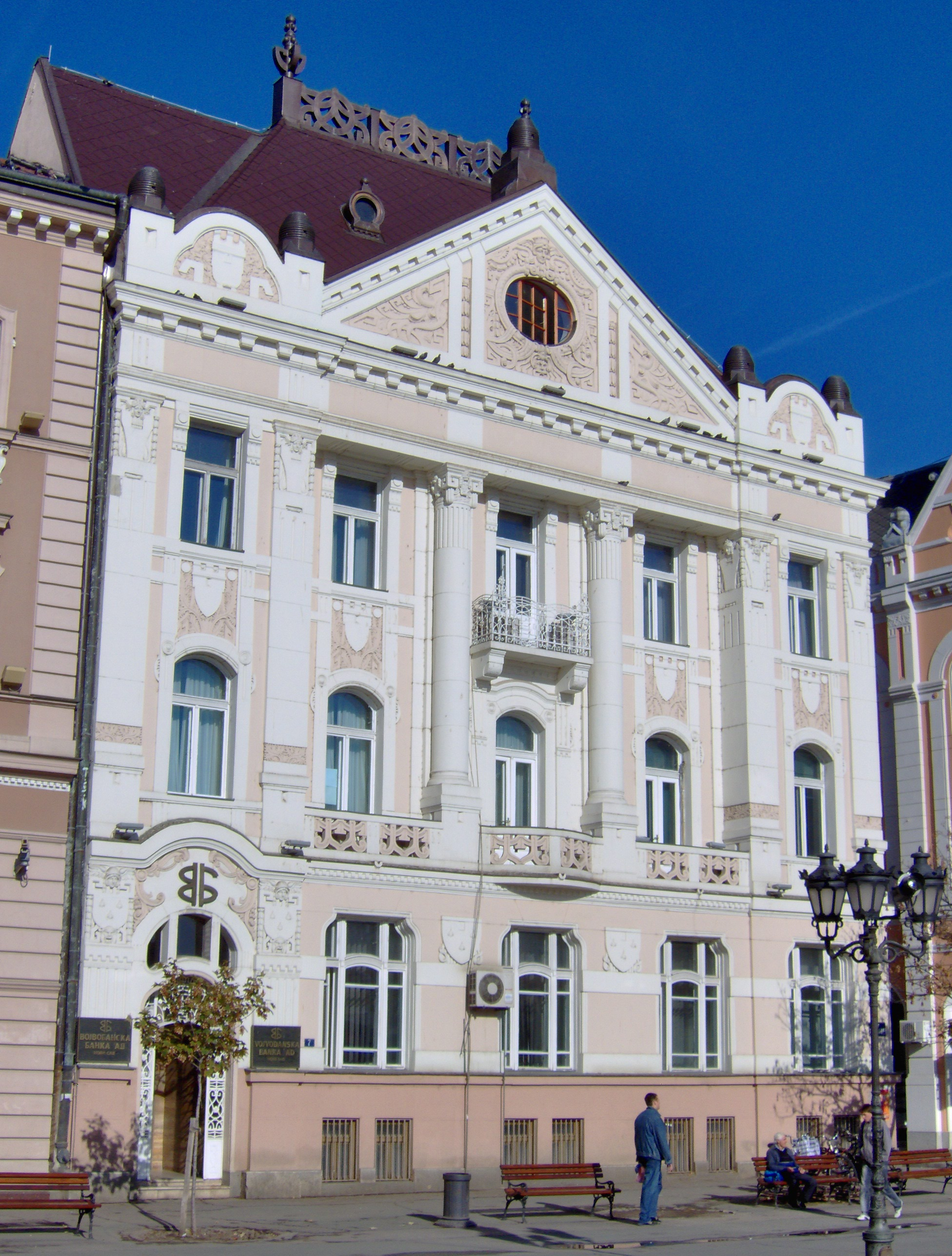 Headquarters of Vojvodjanska banka